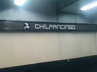 Letrero en la estacion Chilpancingo